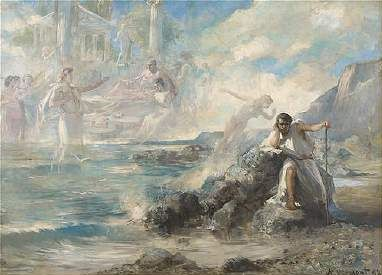 Visul lui Ulise ("Ulysses' Dream", 1893), oil on canvas